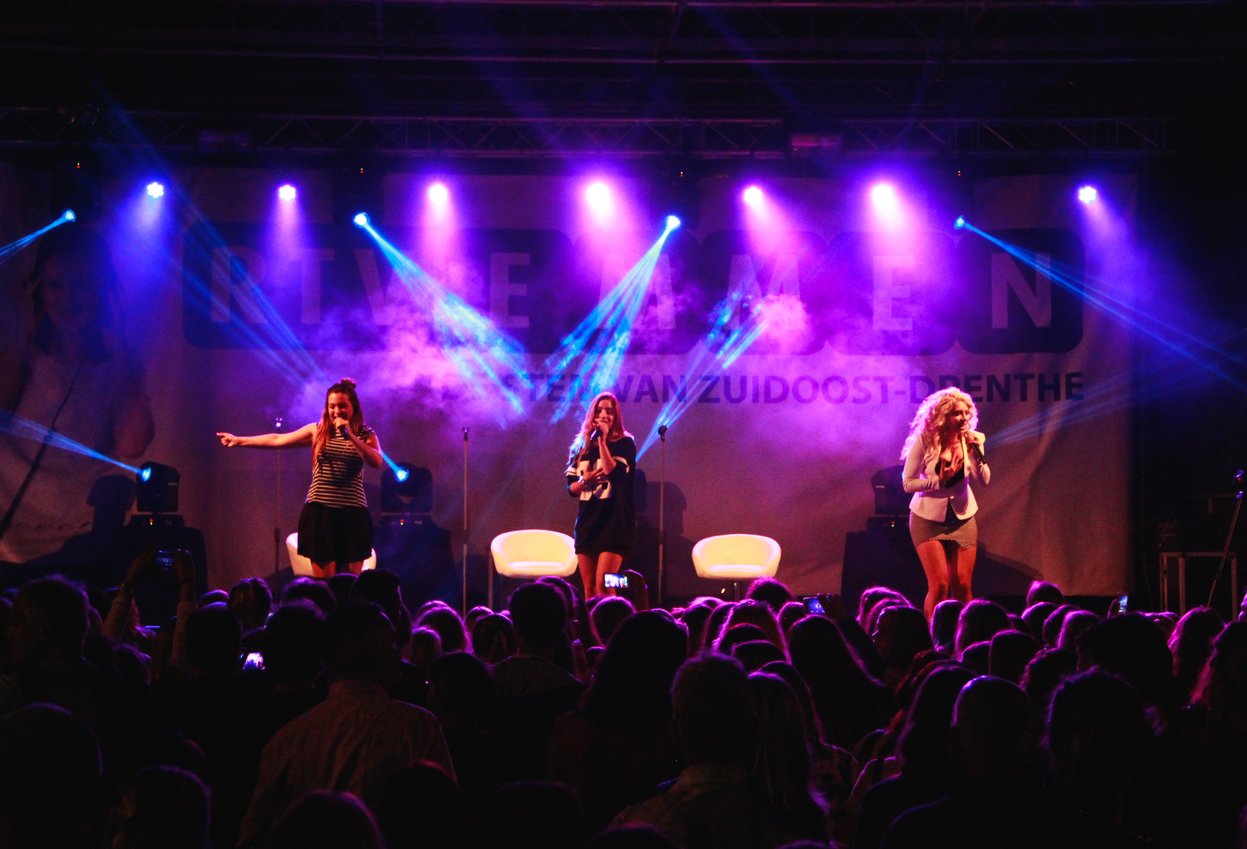 O'G3NE tijdens de Gouden Pijl in Emmen in 2015